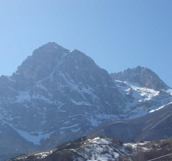 Corno Grande visto dalla A24 Km 136